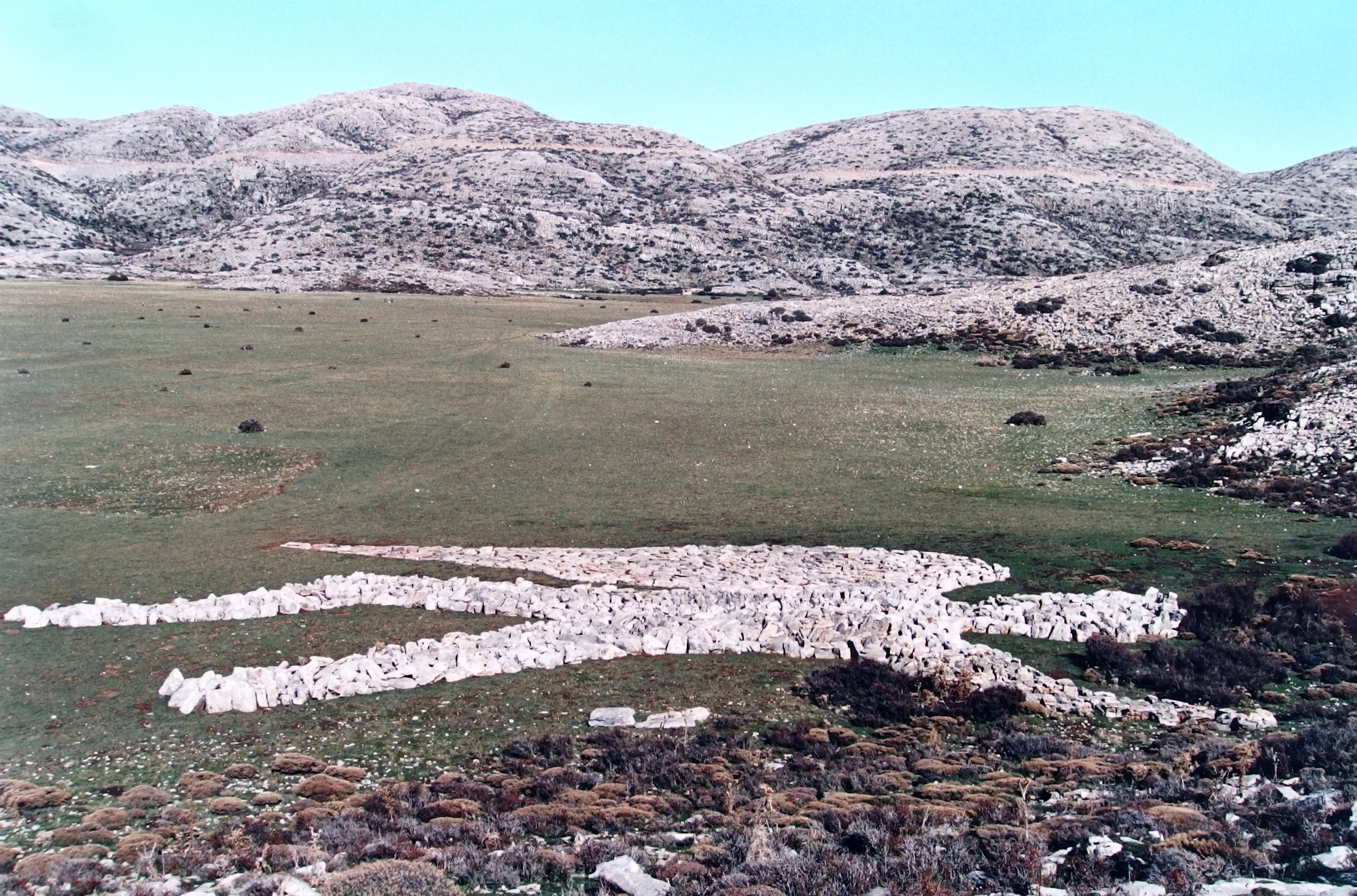 „Andartis“ - Mahnmal des Friedens, um 1990: Von 1989 bis 1991 schuf die Landschaftskünstlerin Karina Raeck, in Zusammenarbeit mit den Bewohnern des Dorfes Anogia und insbesondere mit den Schäfern der kretischen Nida-Hochebene, den „Andartis“.